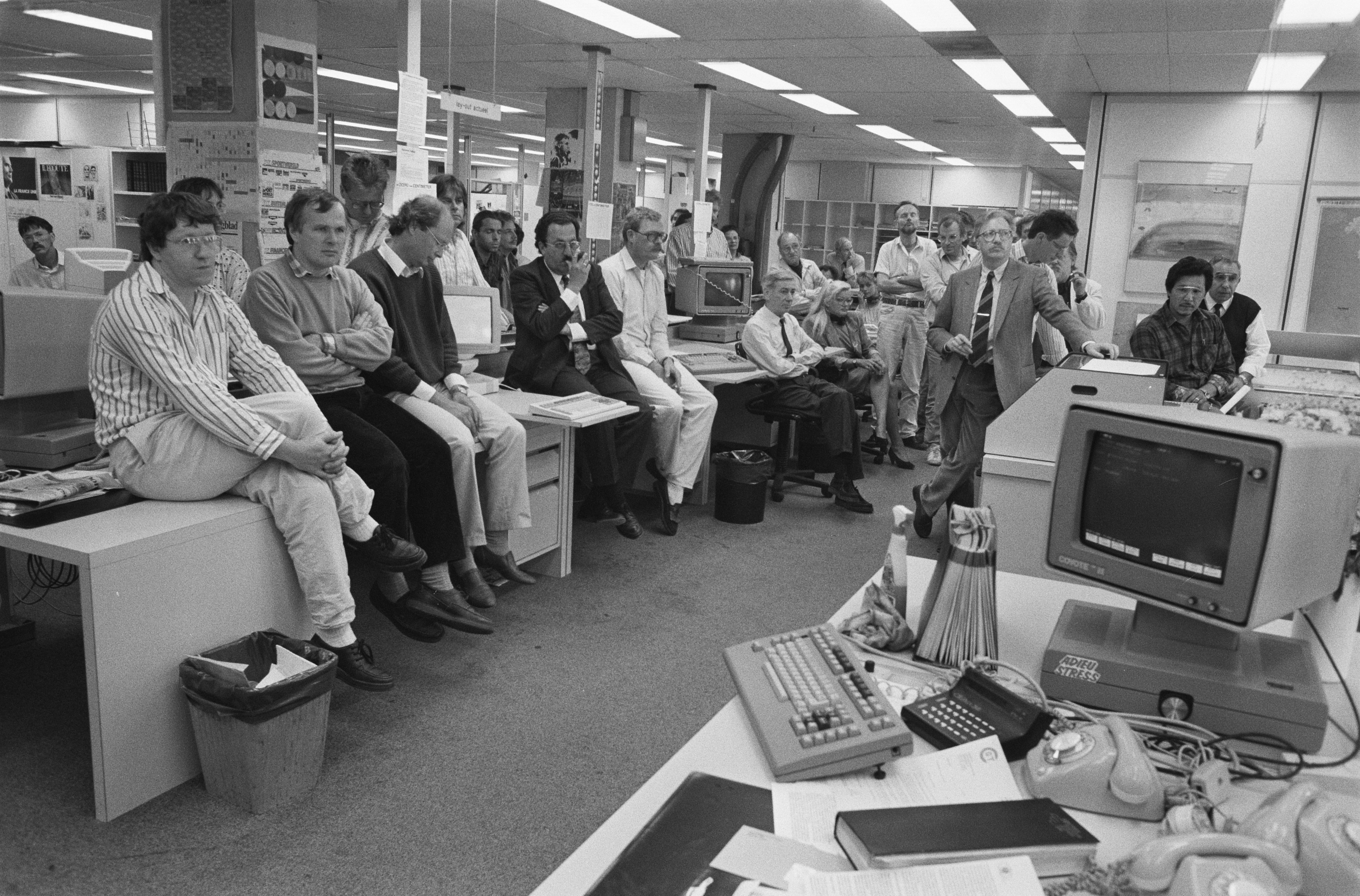 Vergadering op de redactie van het Algemeen Dagblad i.v.m. "de dertiende maand". Datum 5 juni 1989